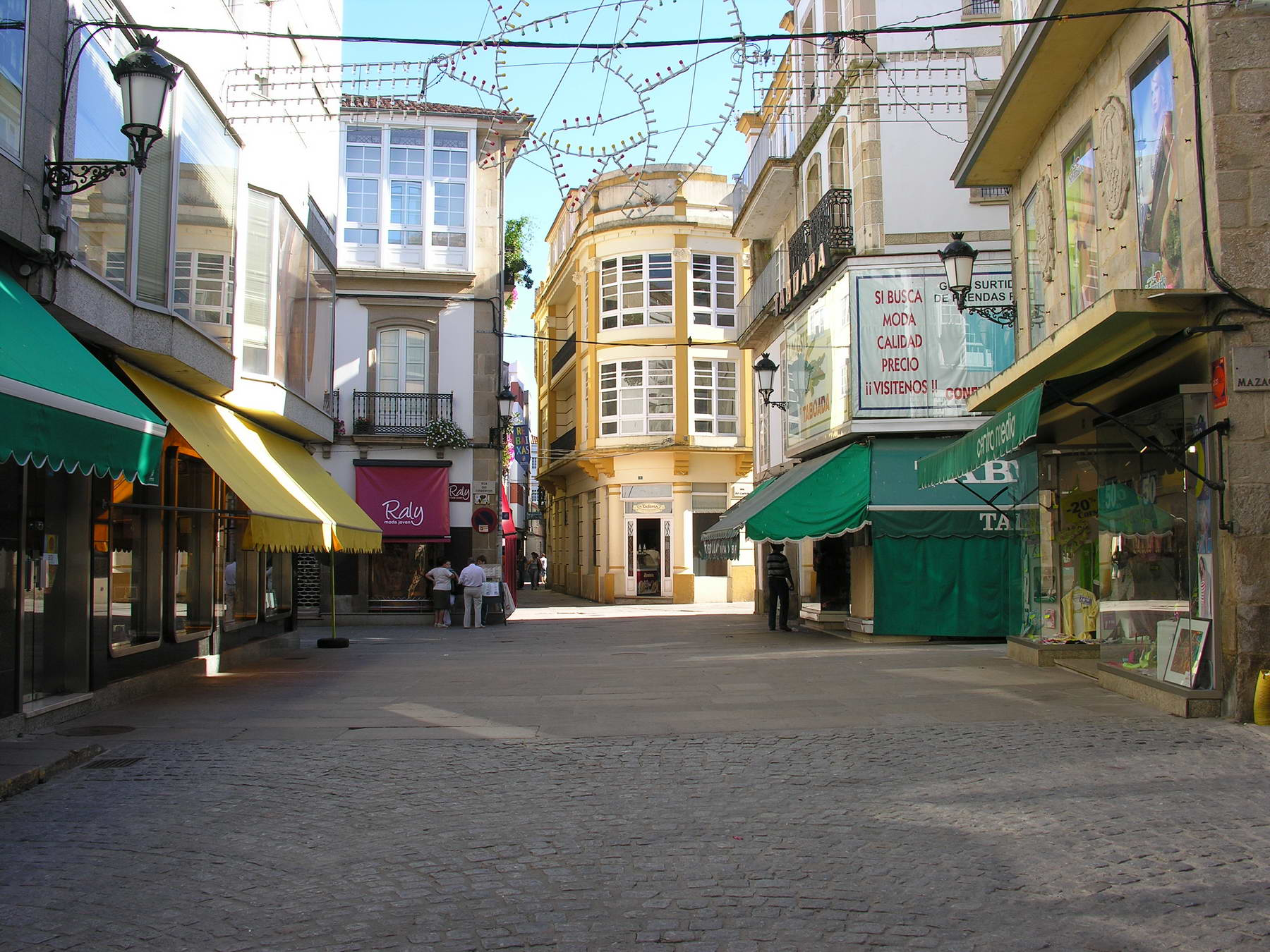 Rúa en Noia, Galicia. Publish by= Luis Miguel Bugallo Sánchez.